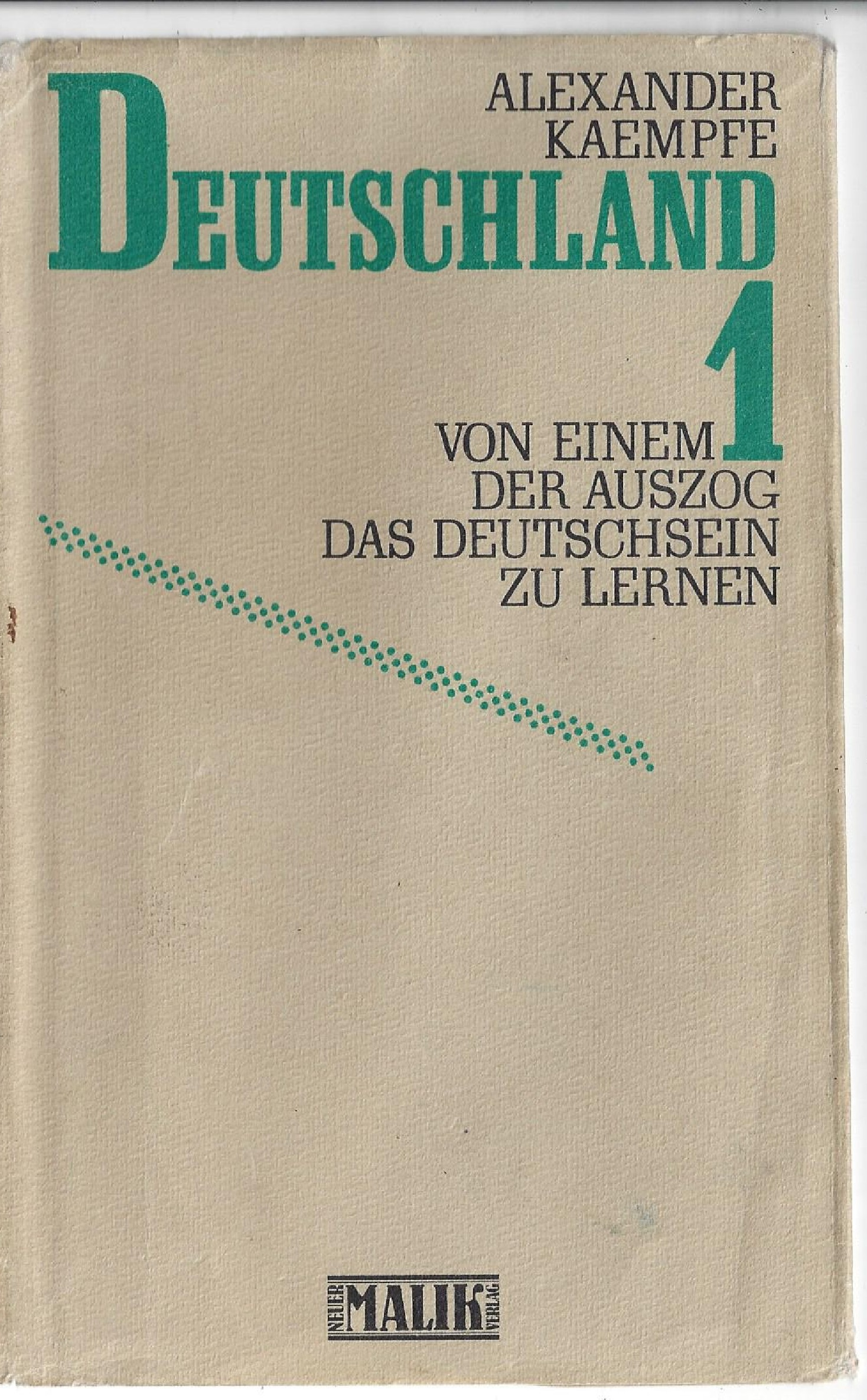 Dies ist ein Scan des einzigen Handexemplares des Buches von Alexander Kaempfe, Es enthält ezahlrecihe handschriftliche Notizen von Kaempfe